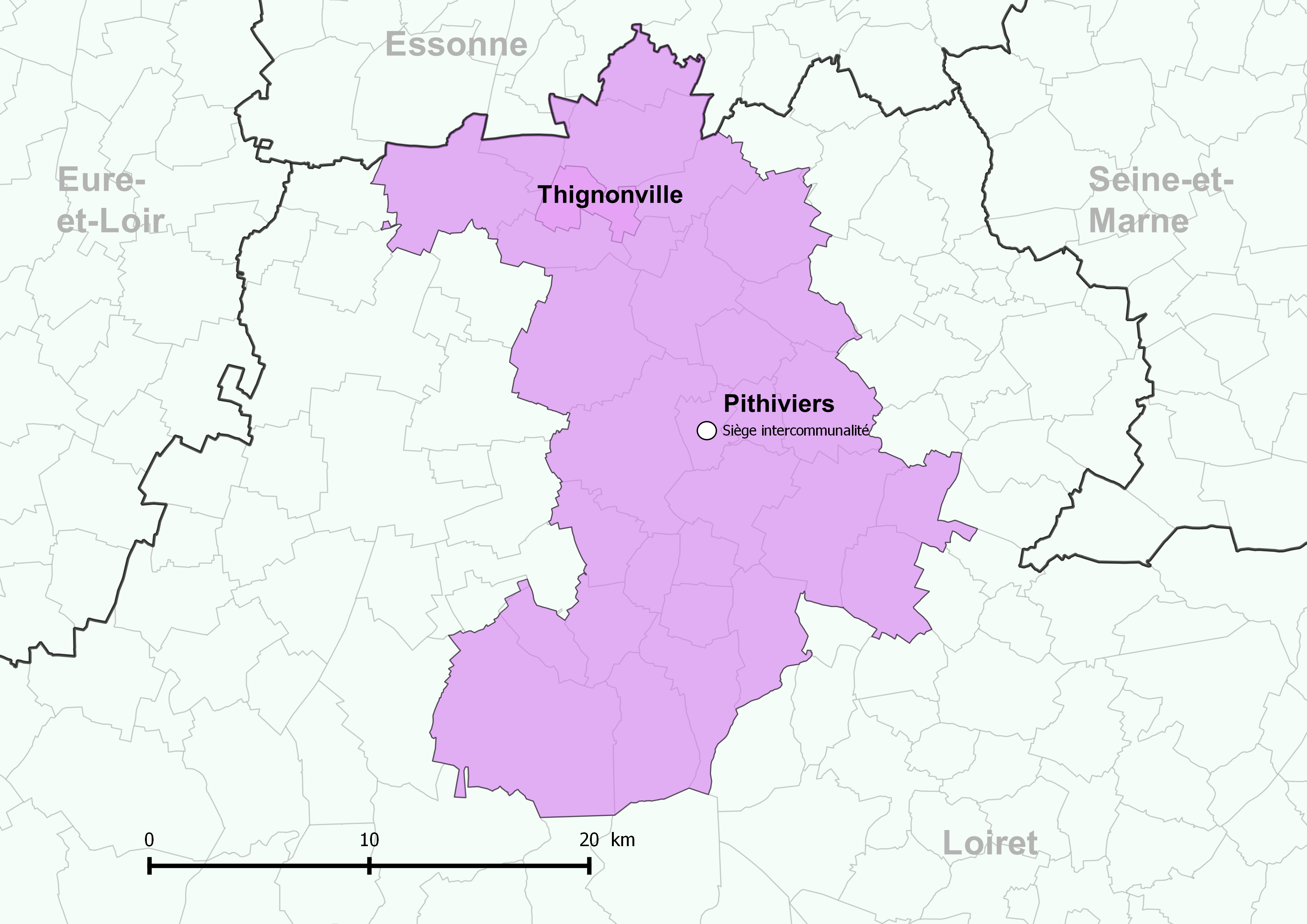 Périmètre de la communauté de communes du Pithiverais - Positionnement de la commune de Thignonville.